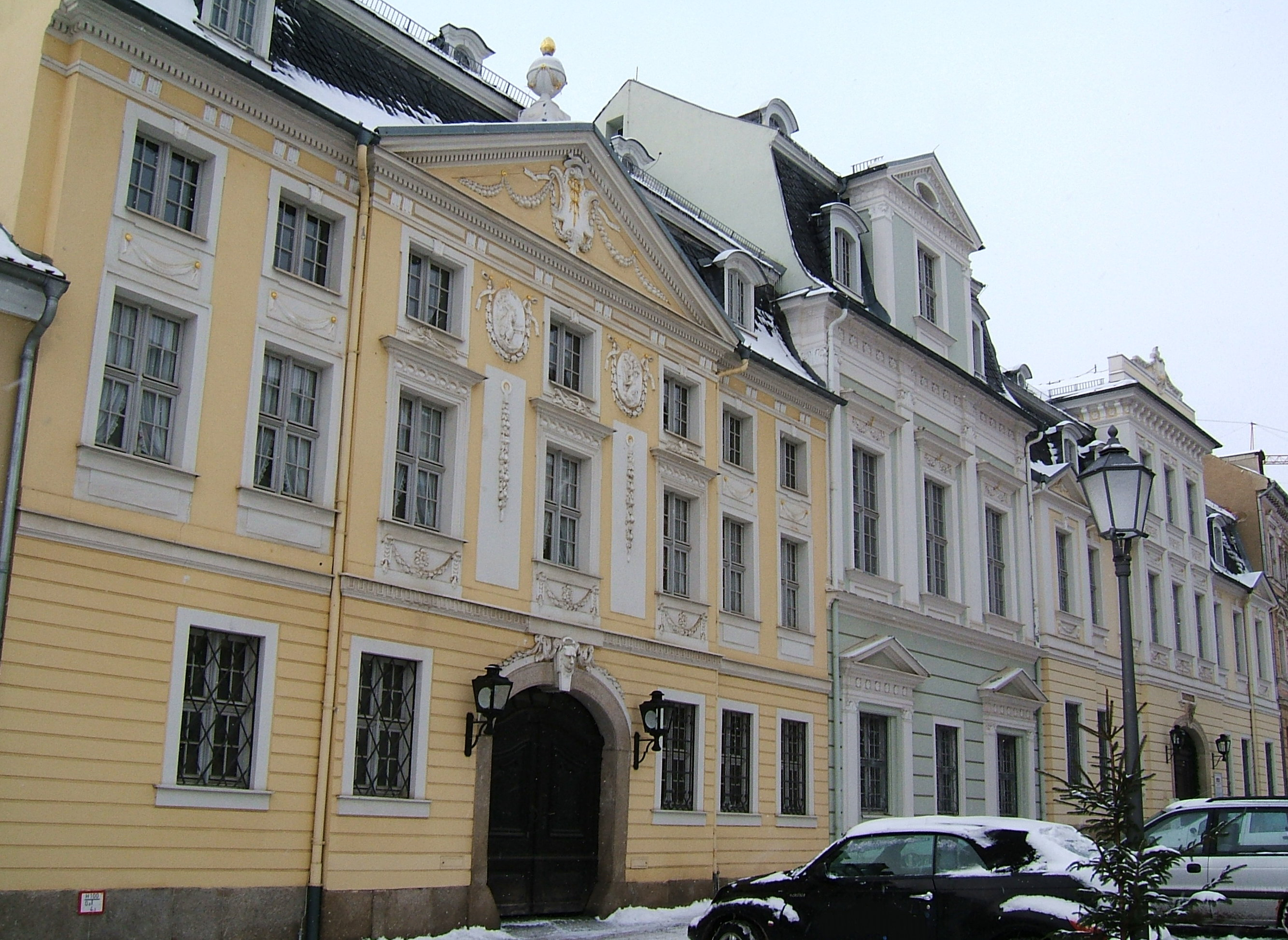 Fassade des Vogtlandmuseums Plauen